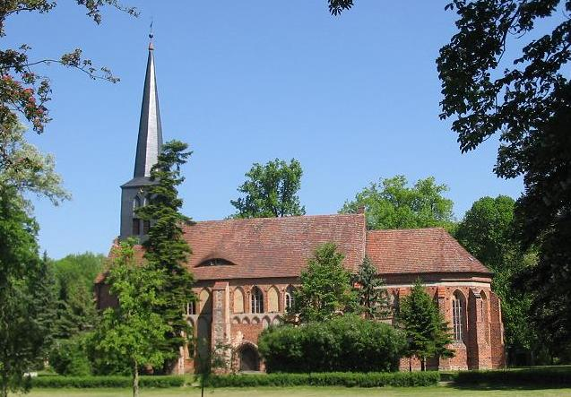 Klosterkirche Marienfließ, Prignitz, Brandenburg